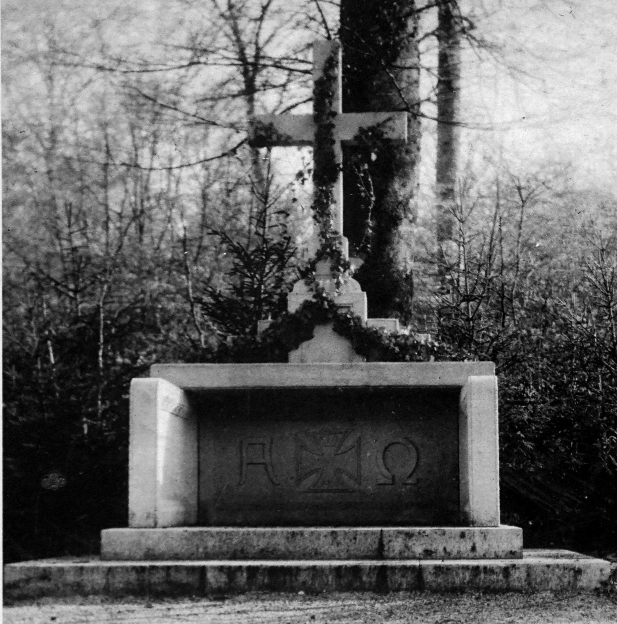 présenté au musée de st-Mihiel.